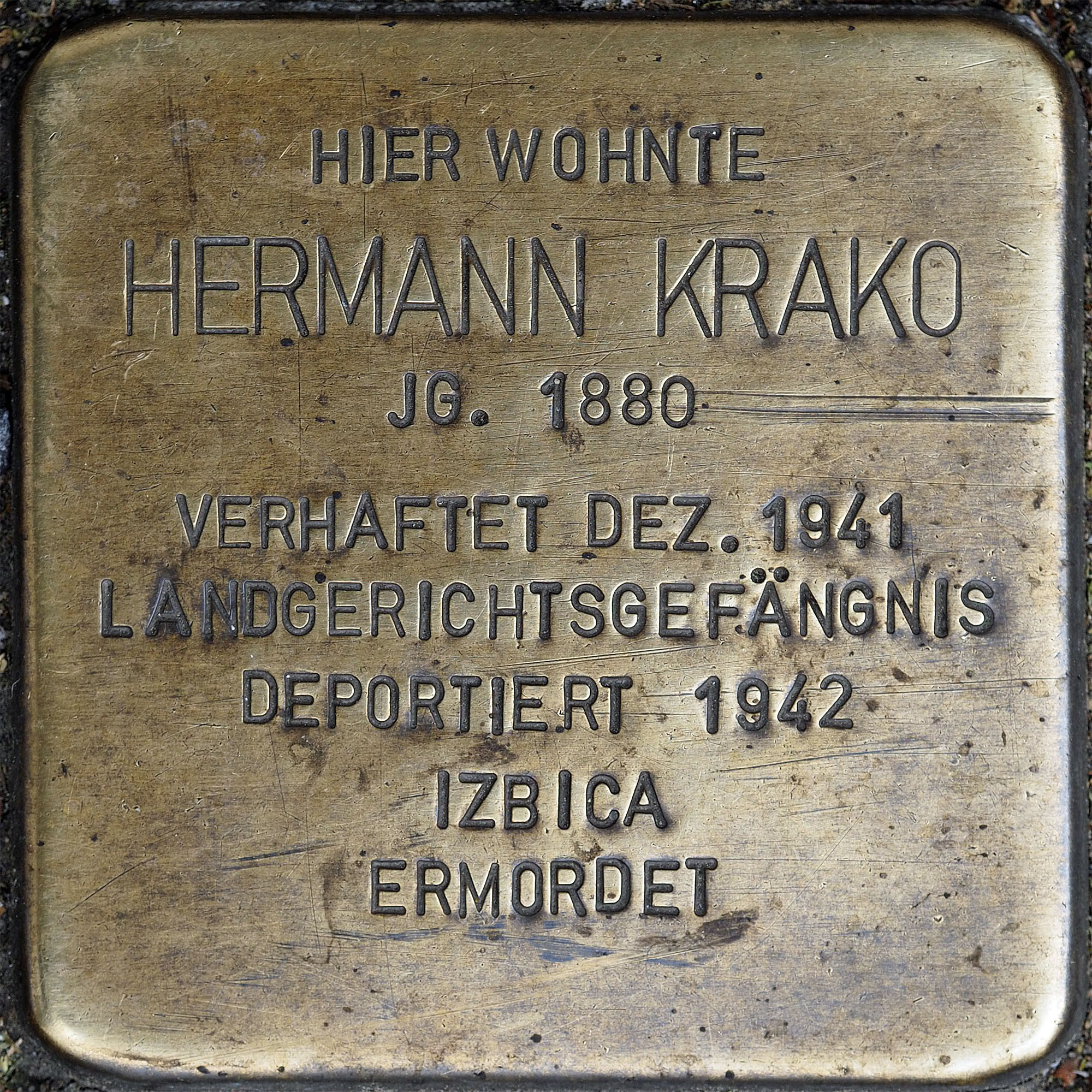 Stolpersteine MG: Krako, Hermann